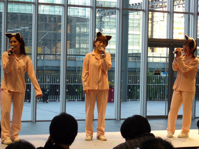 Tagalog: kuha ko ng bandang MUH~ sa isa sa mga live nilang pagtatanghal